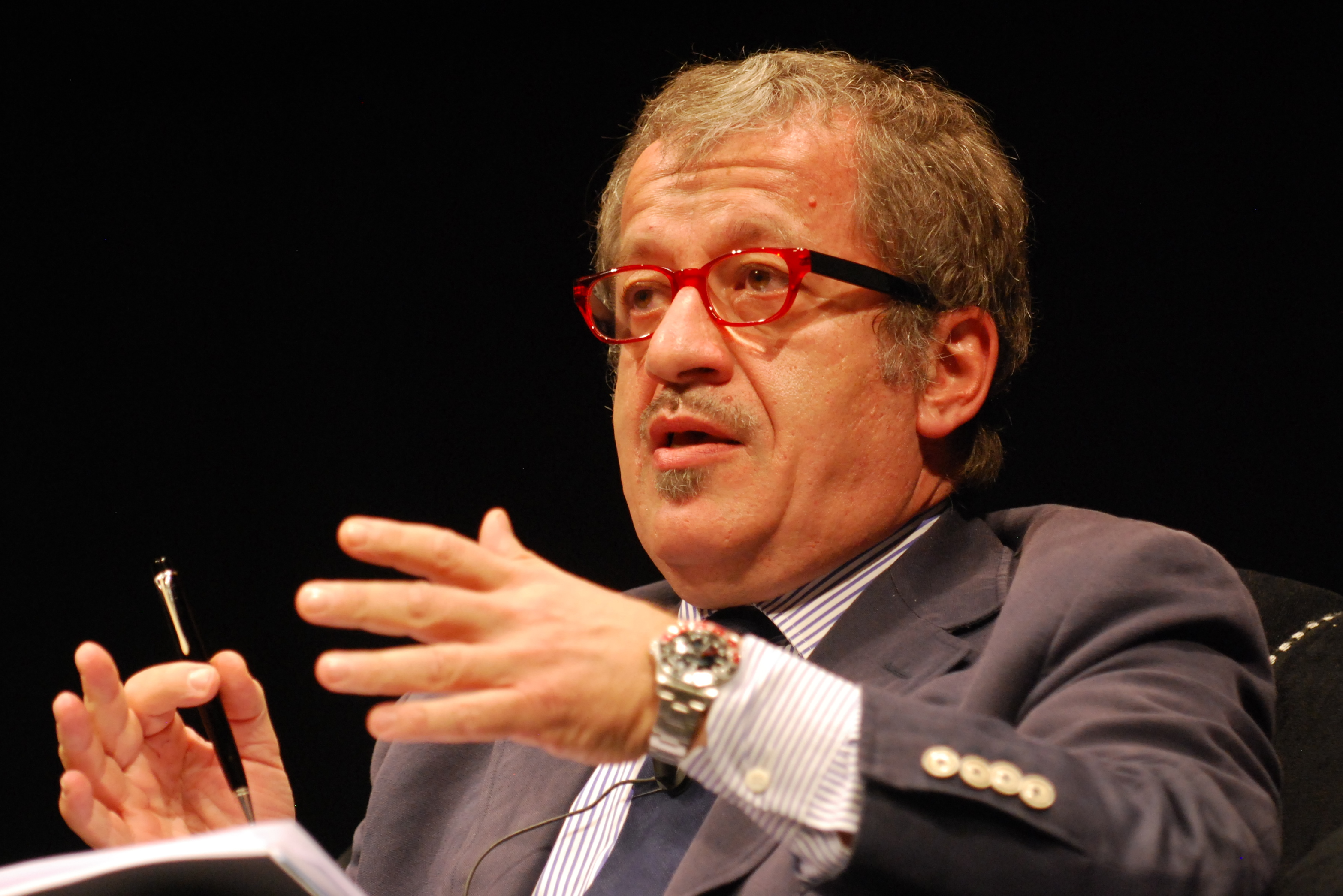 Il Ministro dell'Interno Roberto Maroni al Teatro Sociale di Trento per il Festival dell'Economia.